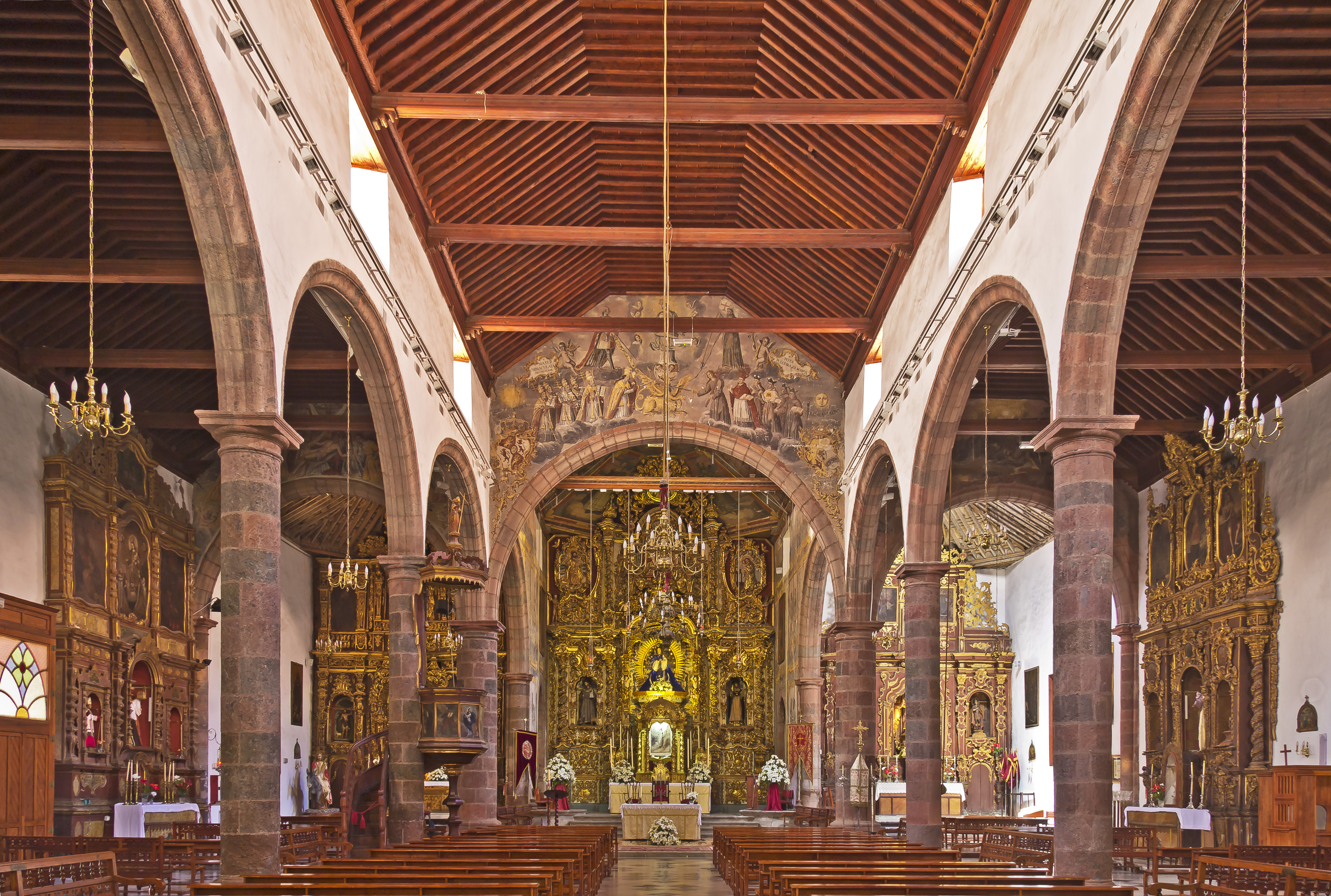 Innenraum der Kirche San Francisco in Santa Cruz de Tenerife